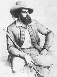 Germain Metternich: Revolutionär 1848/1849, Politiker, amerikanischer Militär der Unionsarmee. Abgebildet mit "Heckerhut" und Flinte als Revolutionär